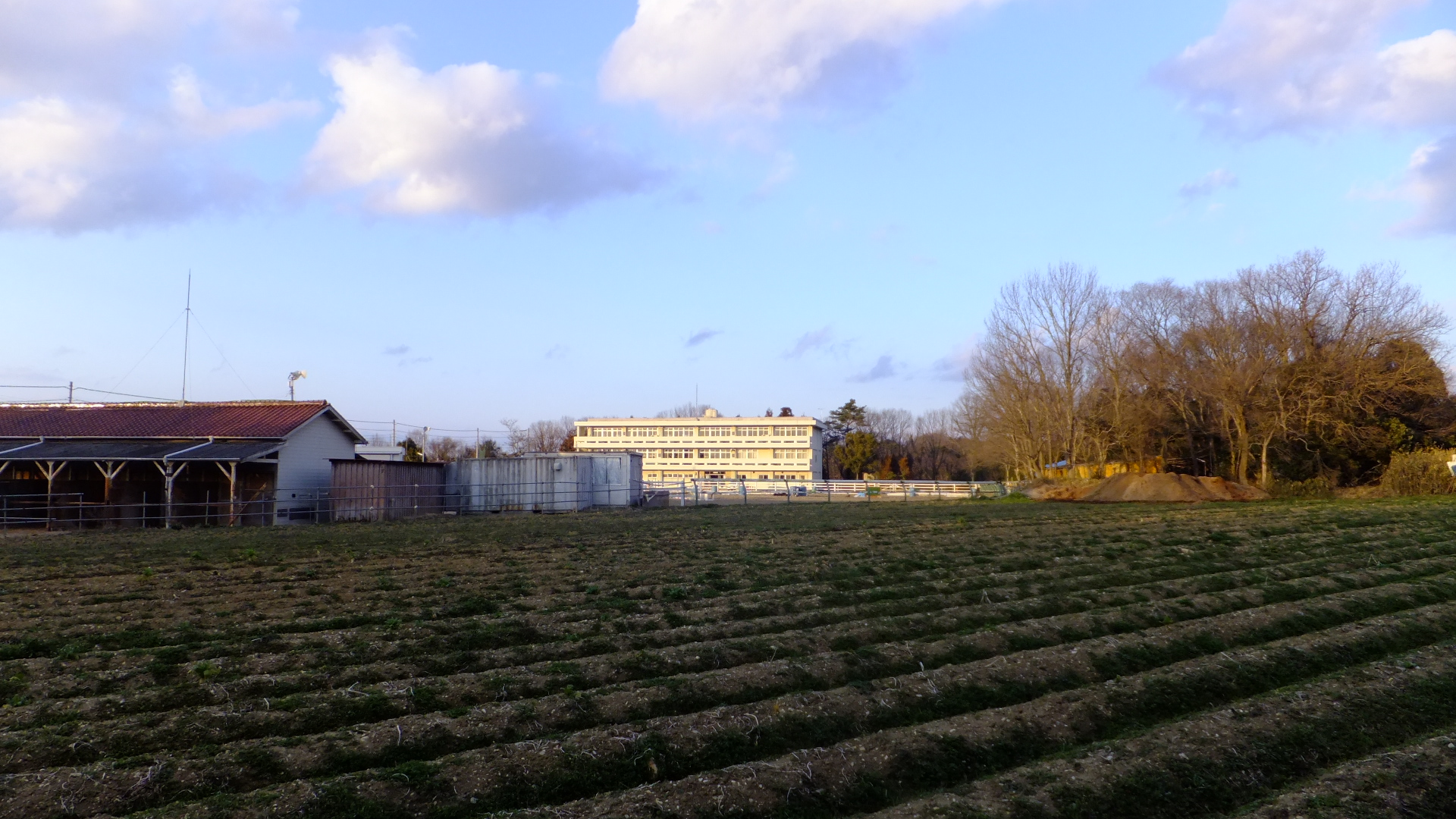 甲南大学廣野グラウンド